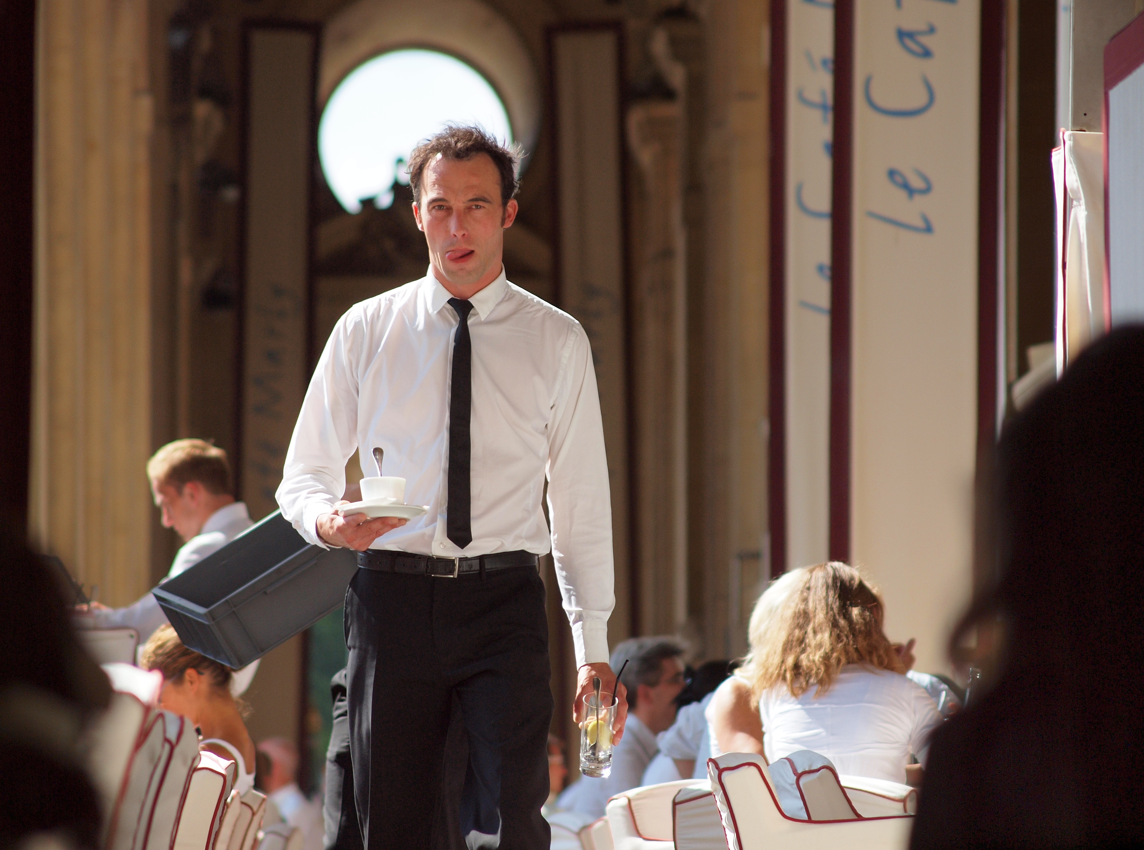 Café Marly, 93 Rue de Rivoli, 75001 Paris, France.